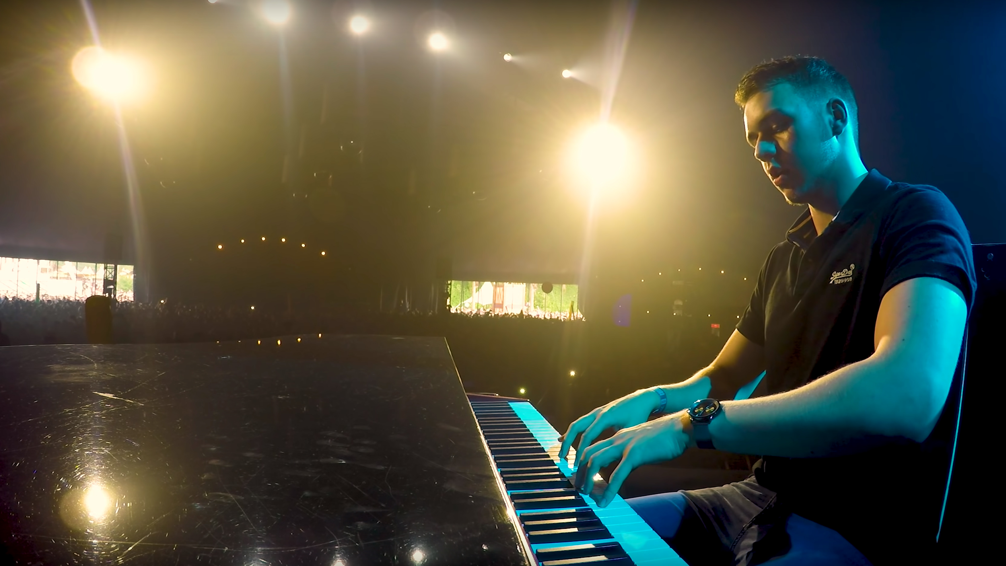 Sefa op Harmony of Hardcore begeleidend met piano.